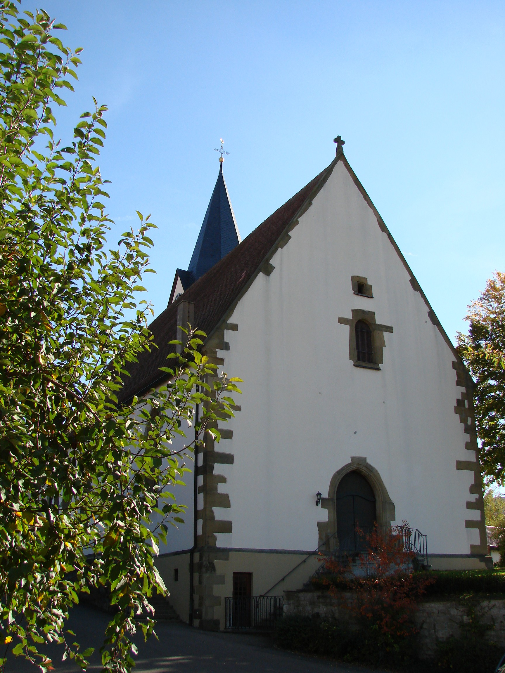 Gemmmrigheim, St-Johannes church, a.d. 1515 - 1531